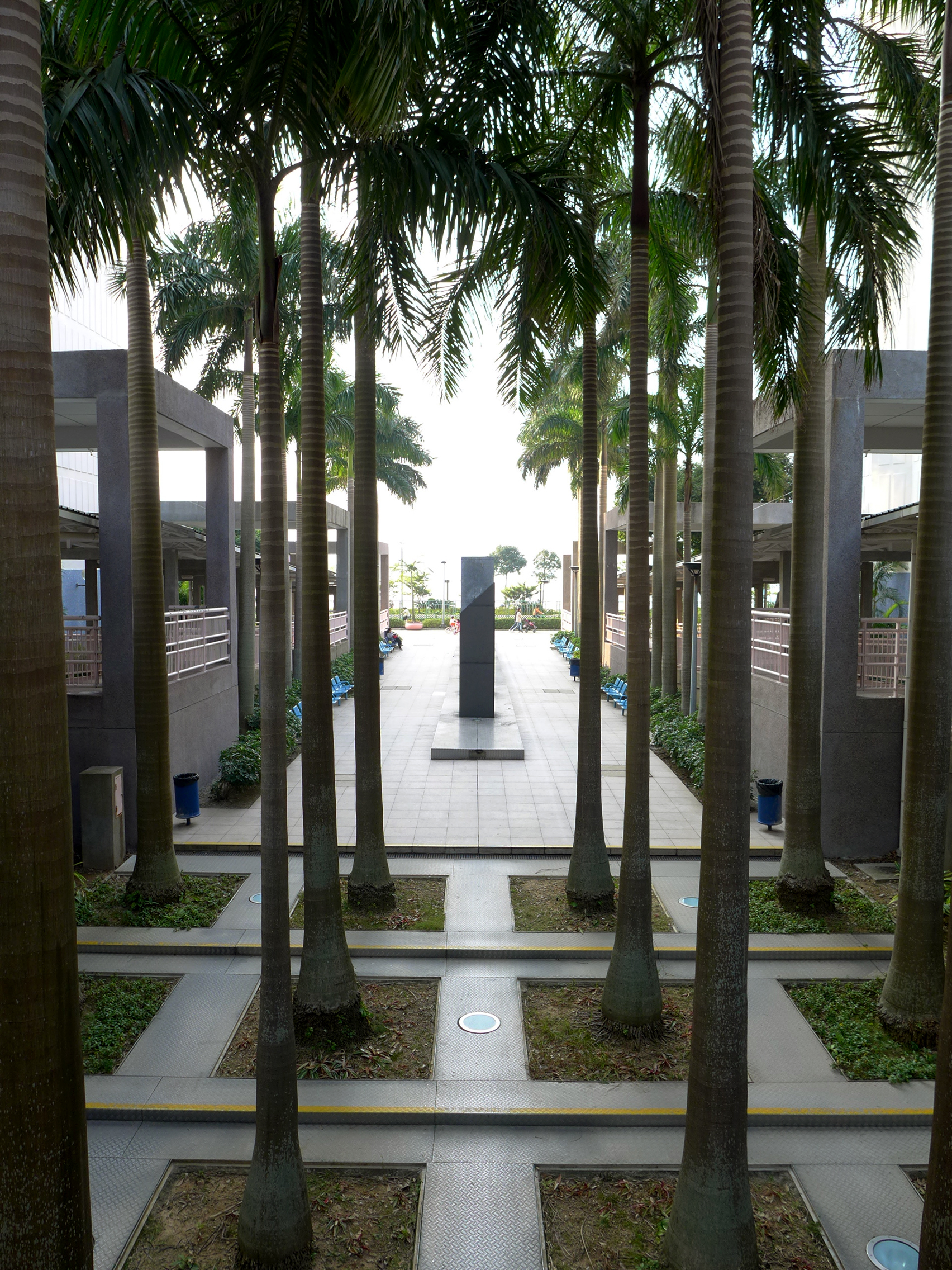 Kam Fung Court Landscape Garden